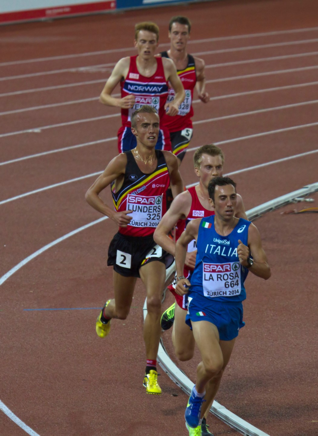 466 mats lunders koen naert 10000m